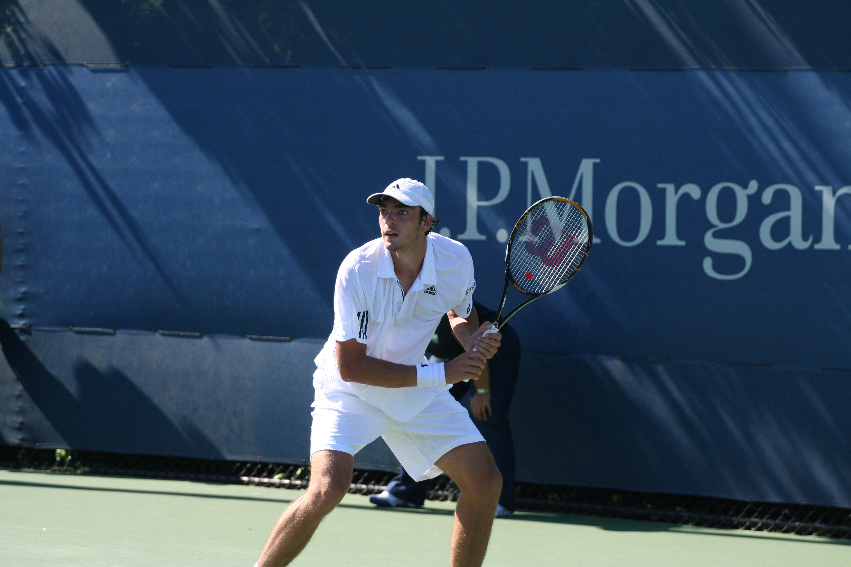 U.S. Open Aug. 30, 2010